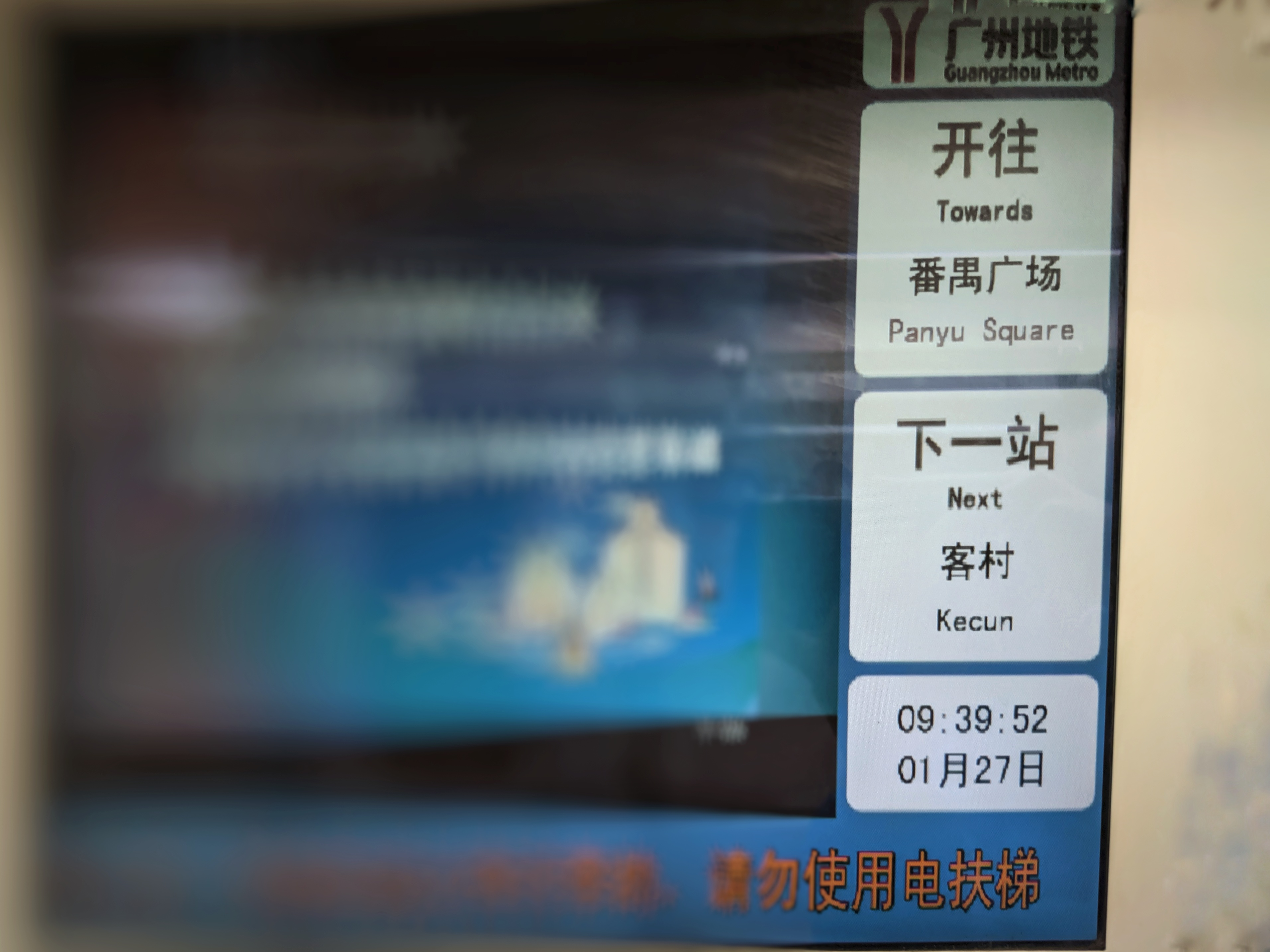 中文（香港）: 廣州地鐵三號綫電視